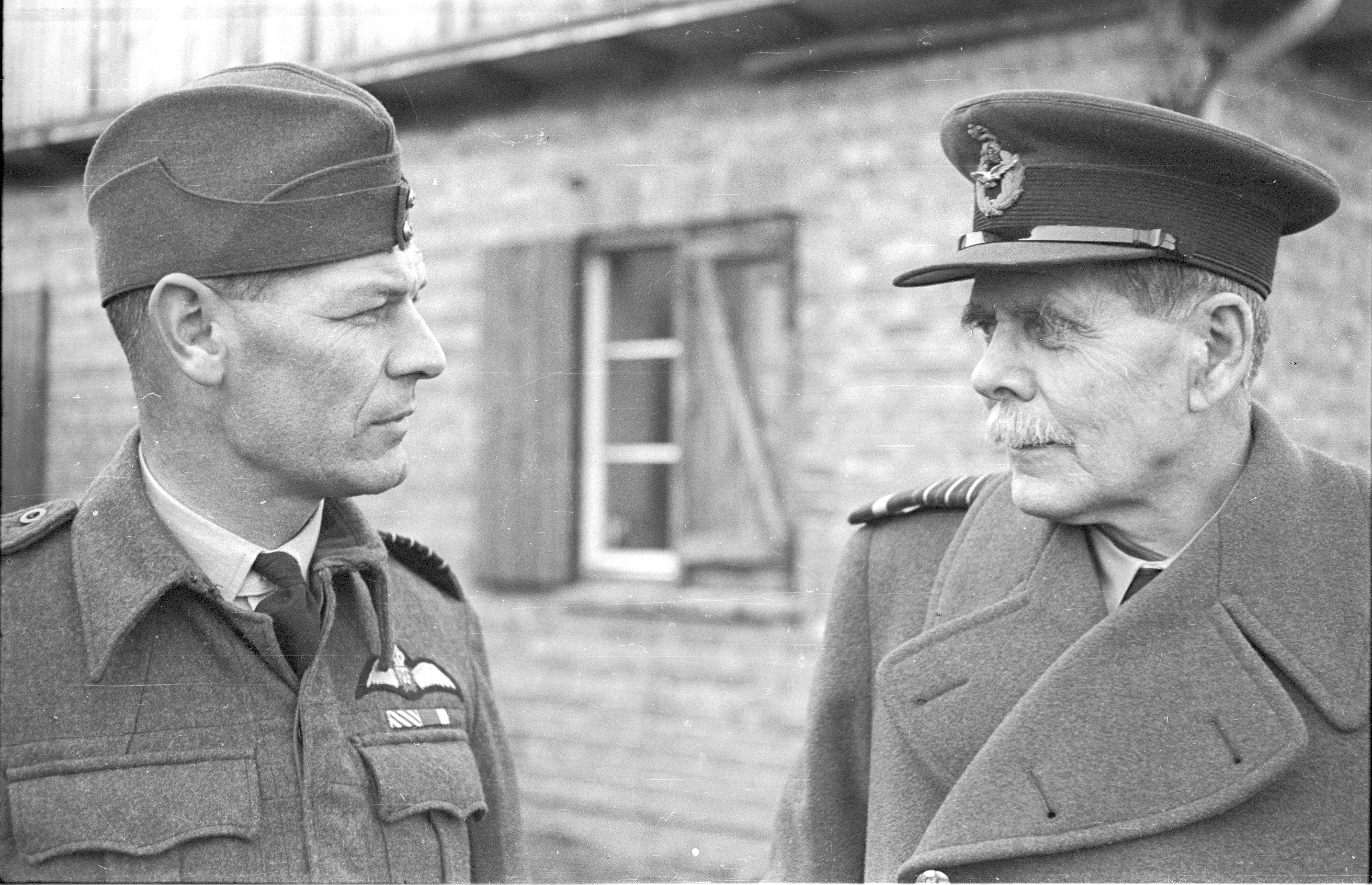 Bildet er hentet fra Arkivverket. Norske flyvere på kontinentet Arkivinstitusjon : Riksarkivet Arkivnavn : NTBs krigsarkiv Sted : UKJENT LAND, 00 Ukjent, 00 Ukjent, Emneord: Andre verdenskrig Avbildet: Douglas Zulu Morris, Hugh Trenchard, Grimbergen, Belgia, 6. november 1944